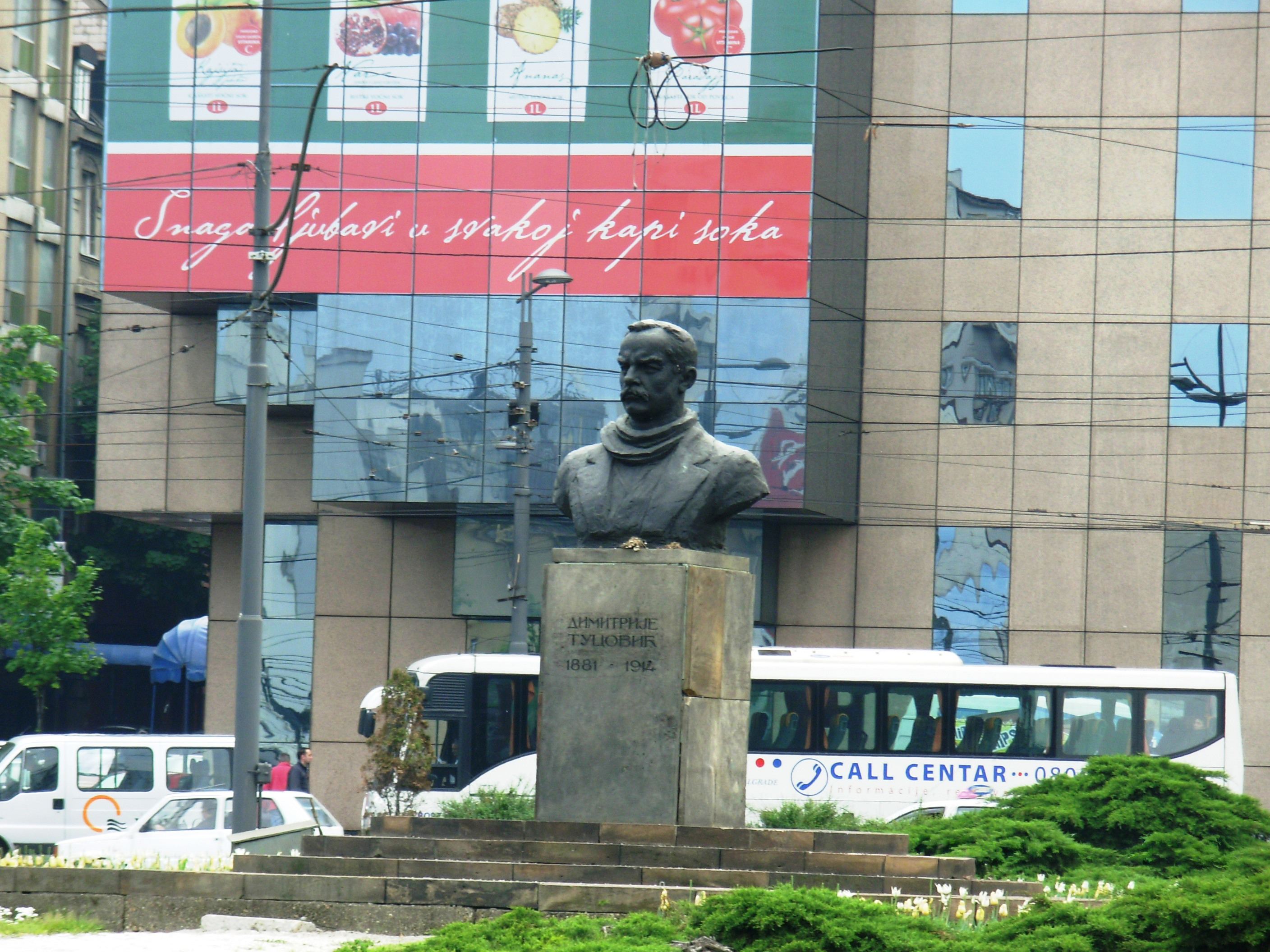 Споменик Димитрију Туцовићу на Славији, београд, Србија. Сликао Голдфингер